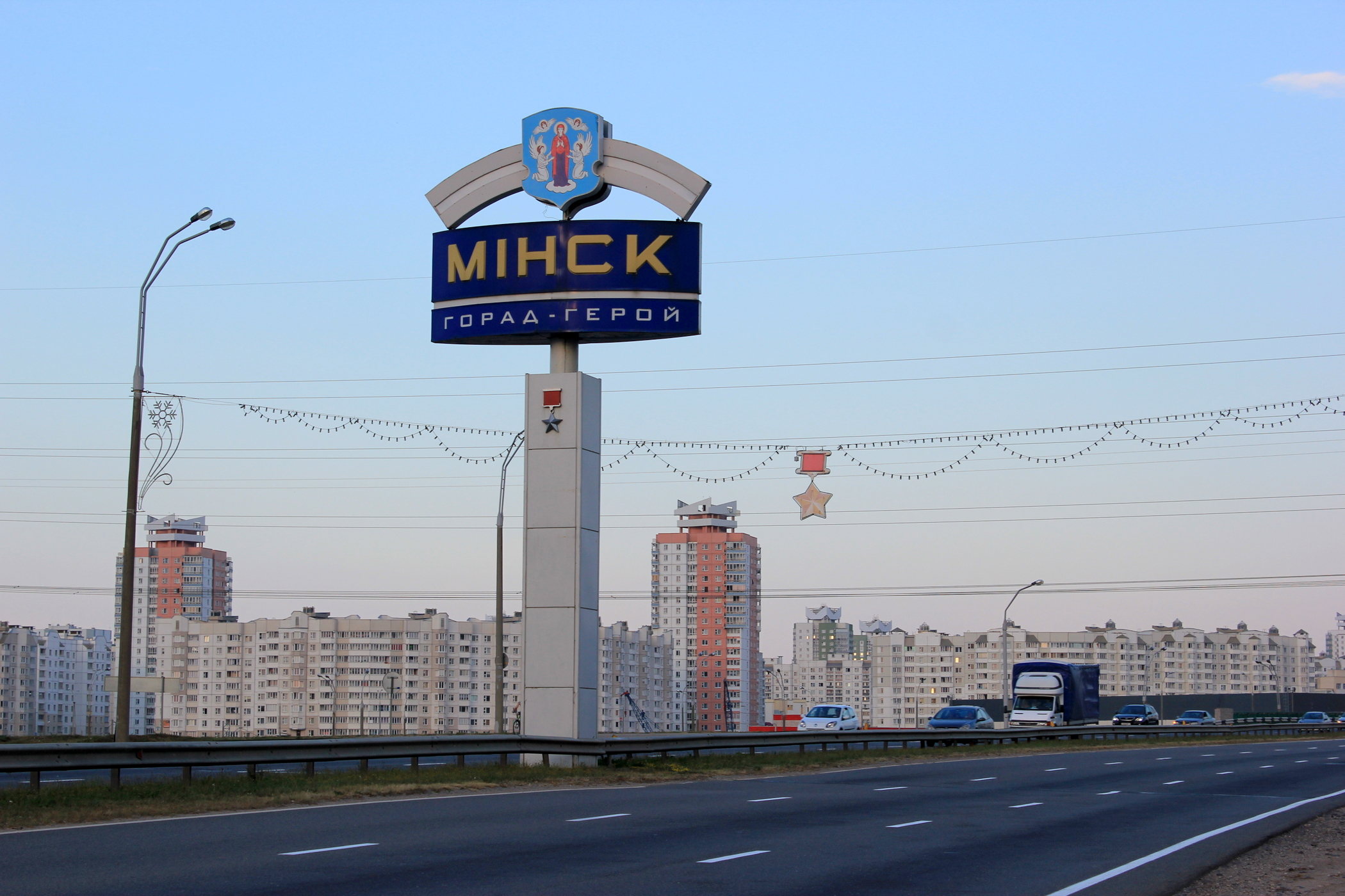 M6, westlicher Ortseingang von Minsk, Belarus.